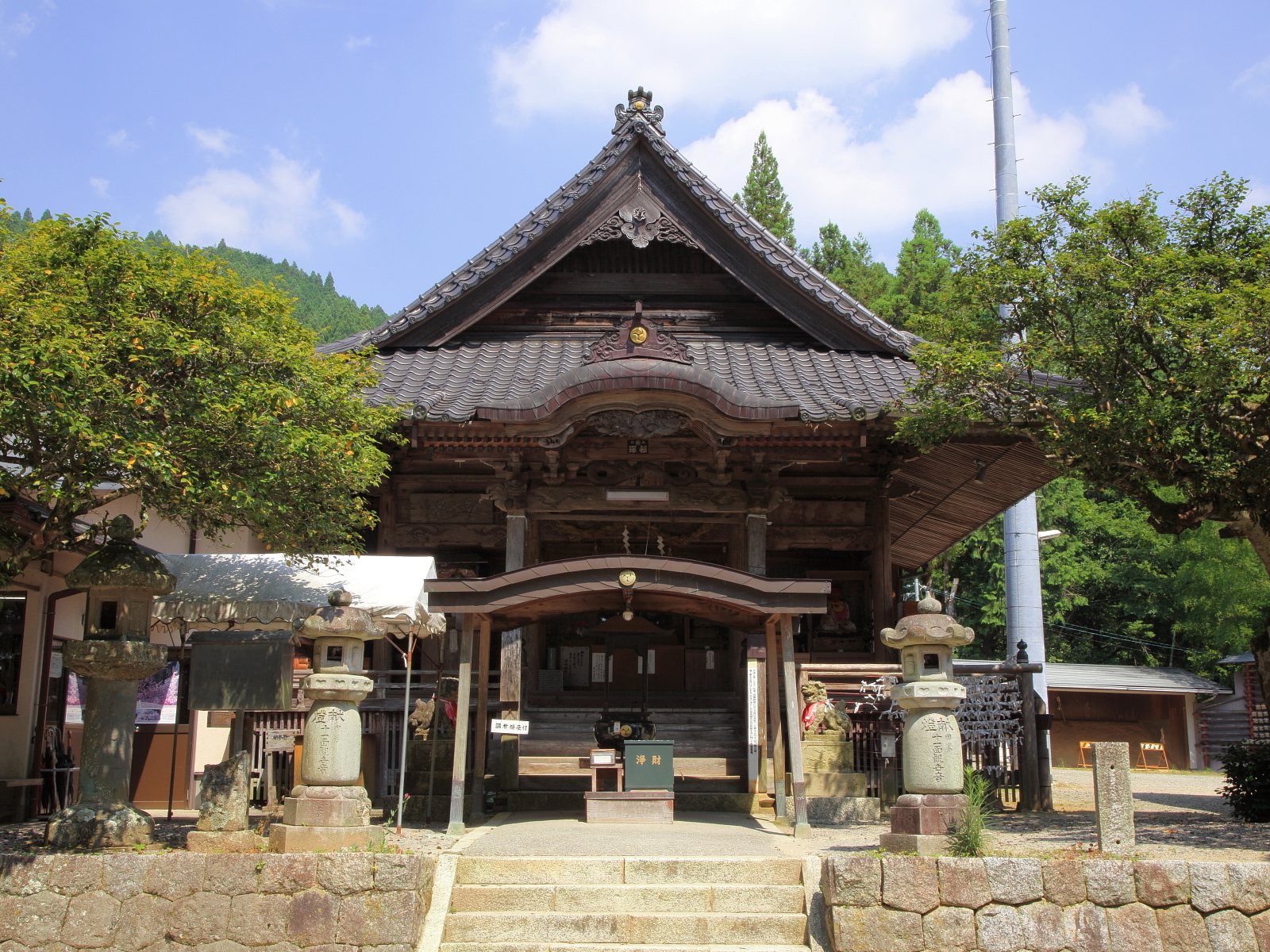 愛知県北設楽郡設楽町田峯にある谷高山高勝寺本堂。通称は田峯観音（田峰観音）。